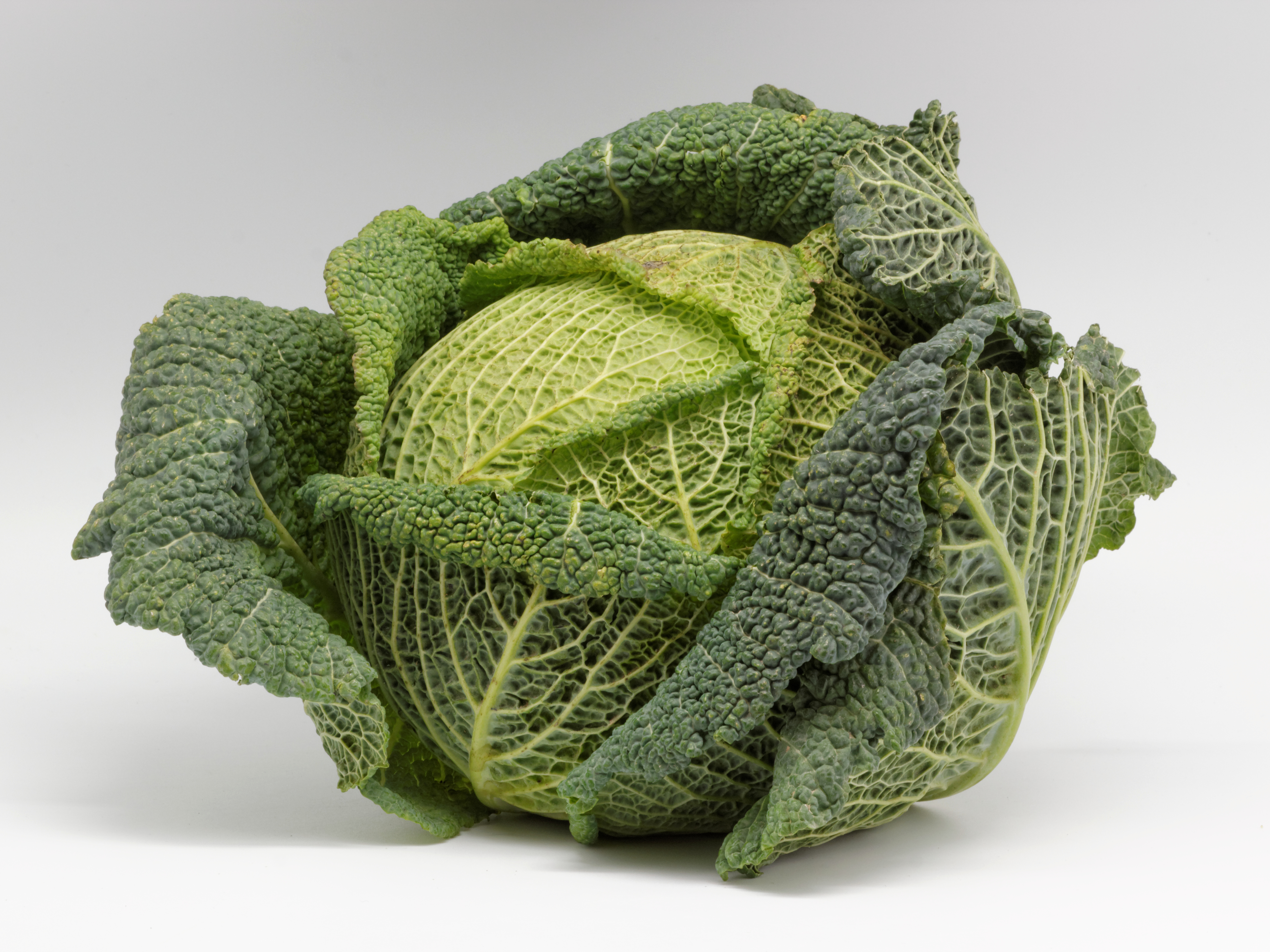 Brassica oleracea var. sabauda